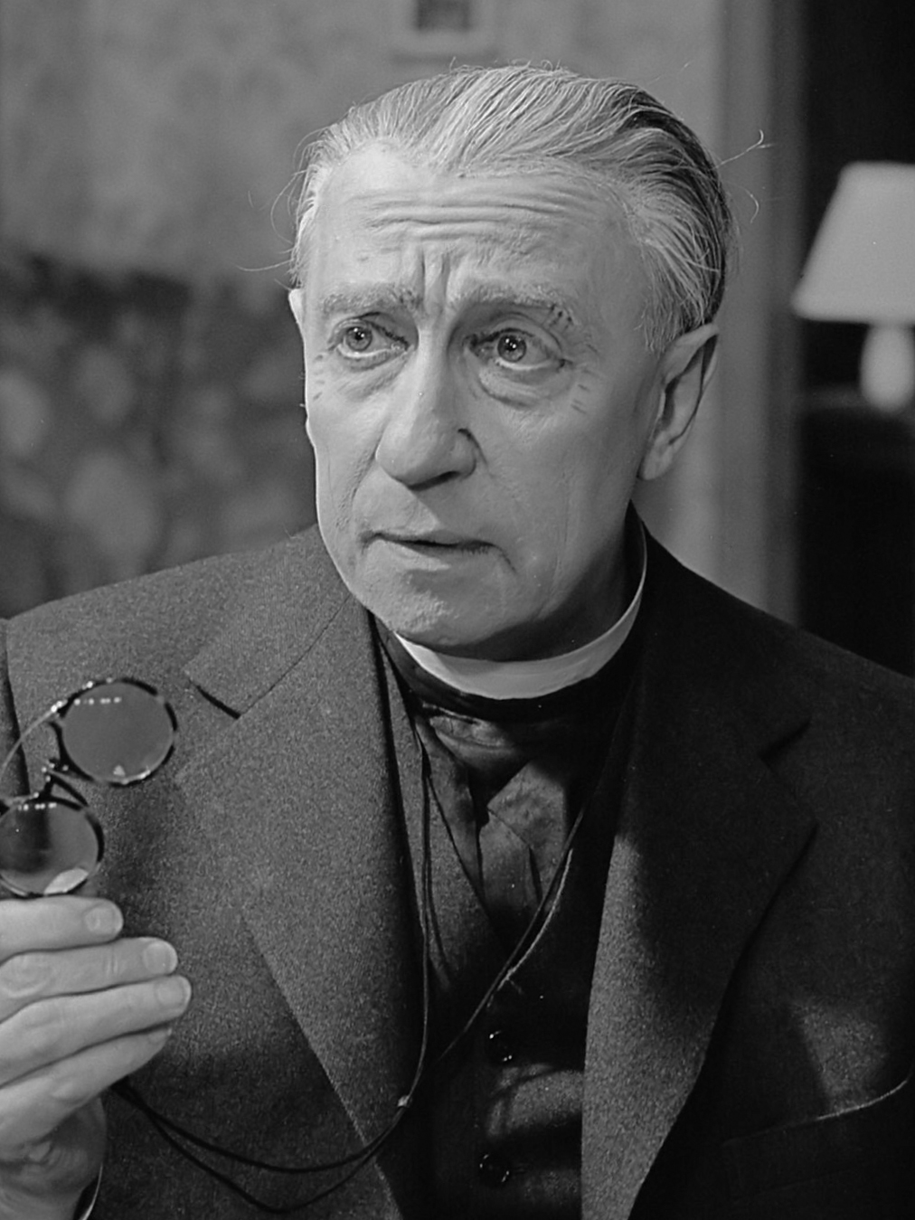 Cor Ruys, 40-jarig toneeljubileum. De jubilaris maakt een tournee door het land met het stuk "De familie Gregory" van Wynyard Brown met Cor Ruys in de hoofdrol van domineer Martin Gregory. De première gaat op 1 november 1950 in Rotterdam. 28 oktober 1950